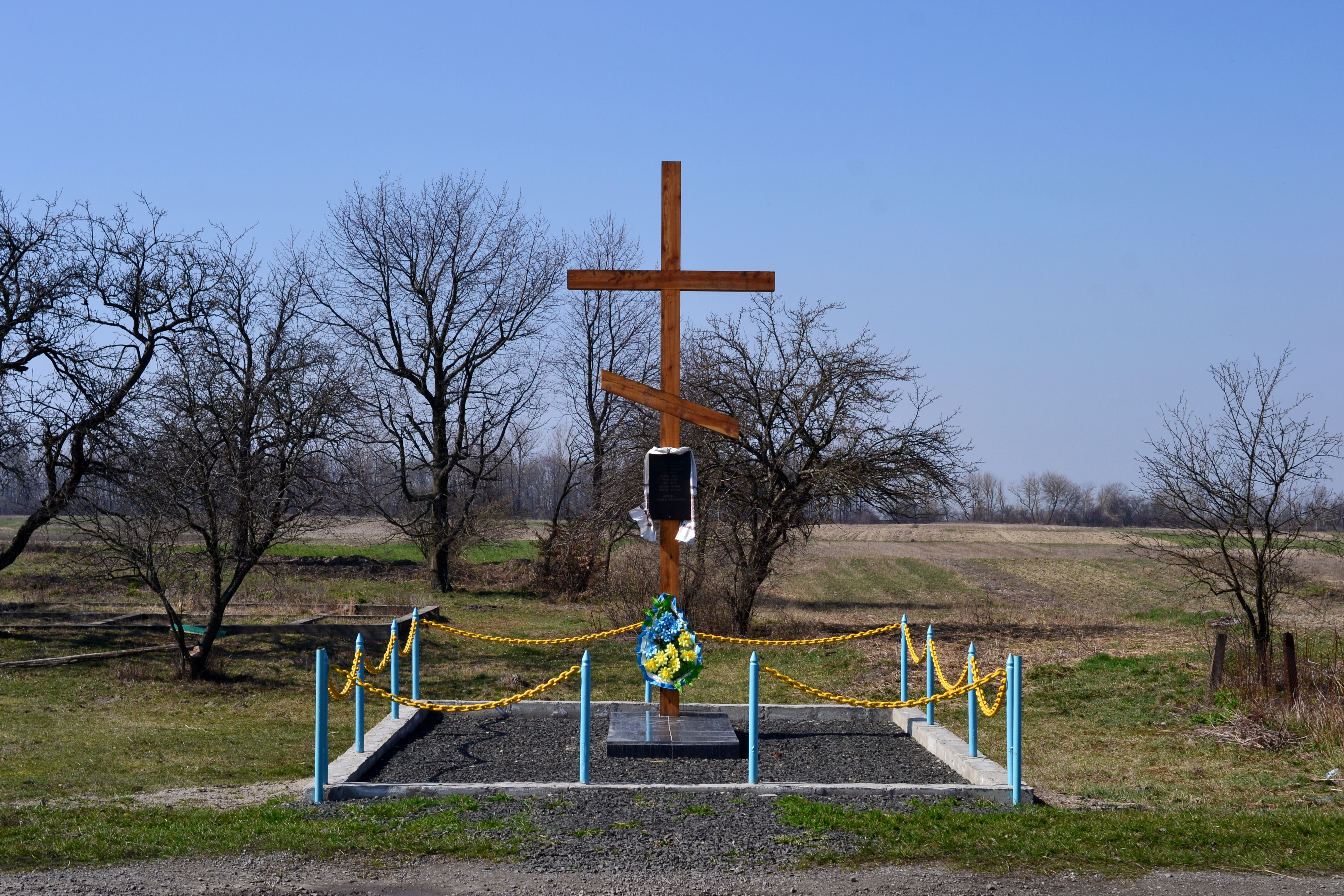 Могила братська 3 воїнів УПА з сотні «Ягоди» (1944 рік) - загальний вигляд - Долинка (на південній околиці села, біля дороги) Іваничівський район Волинська область Україна